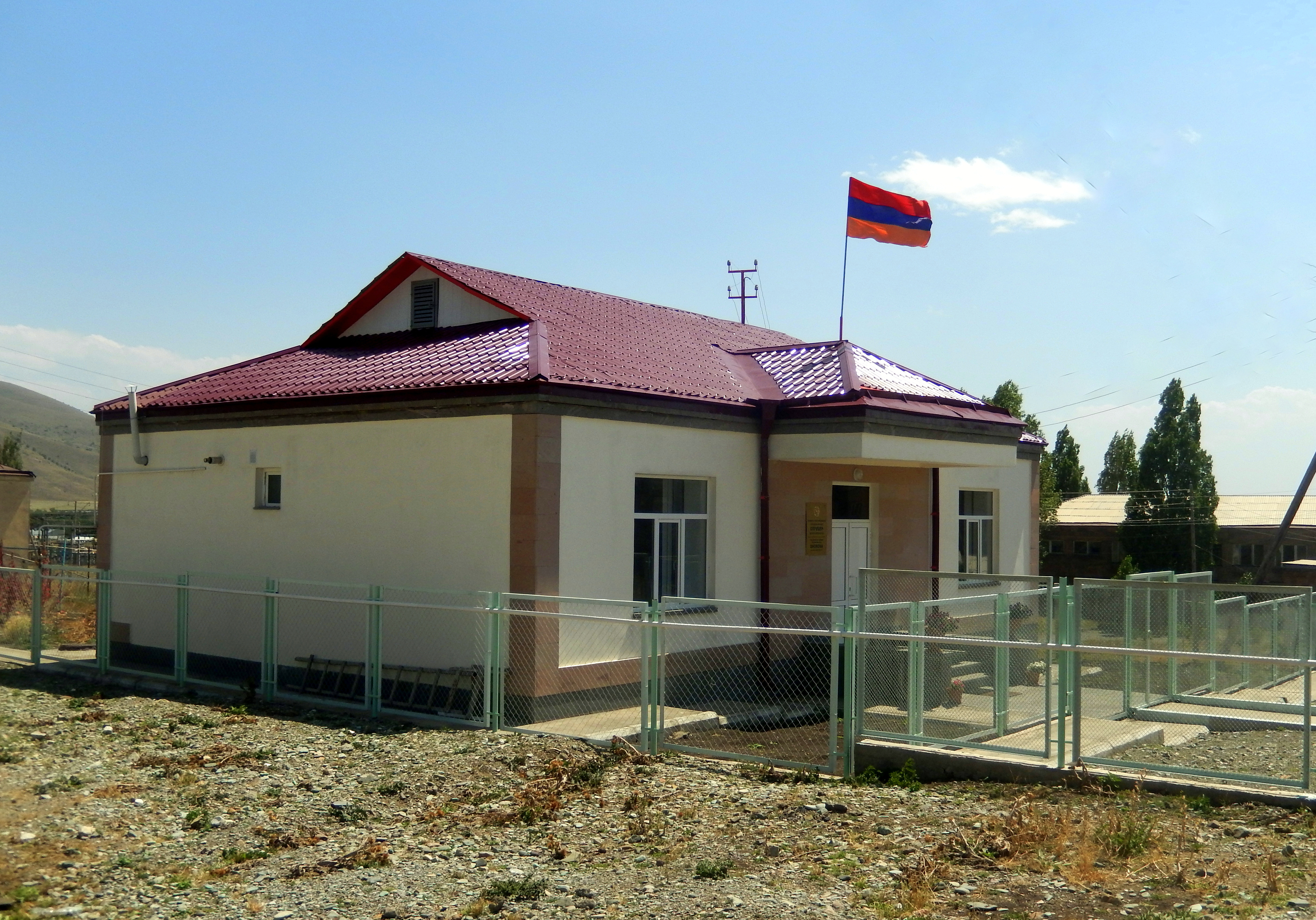 Շորժայի գյուղապետարան